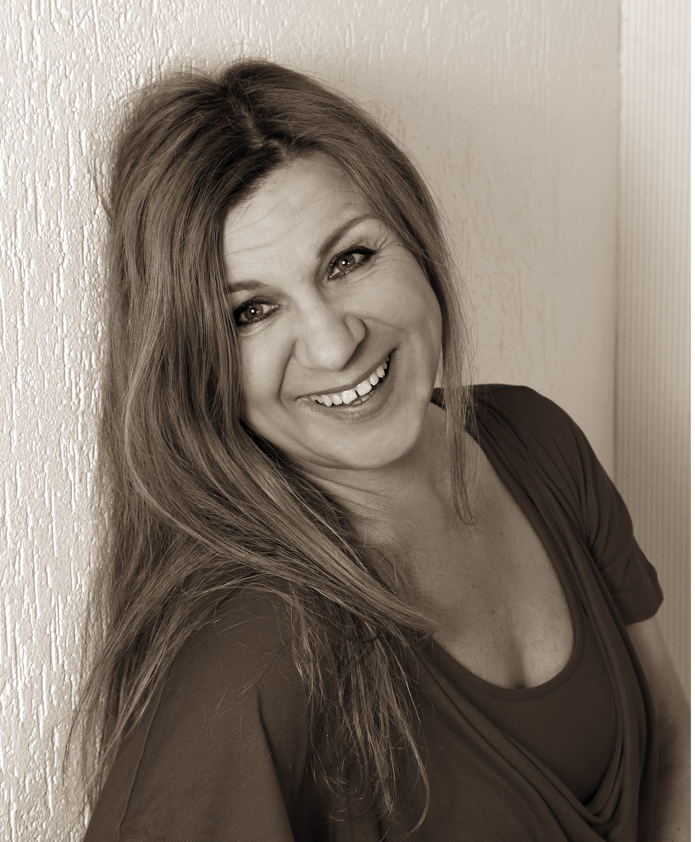 Sabine Ludwigs, Lüner Schriftstellerin